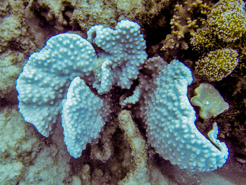 Turbinaria peltata en isla Lizard, Australia